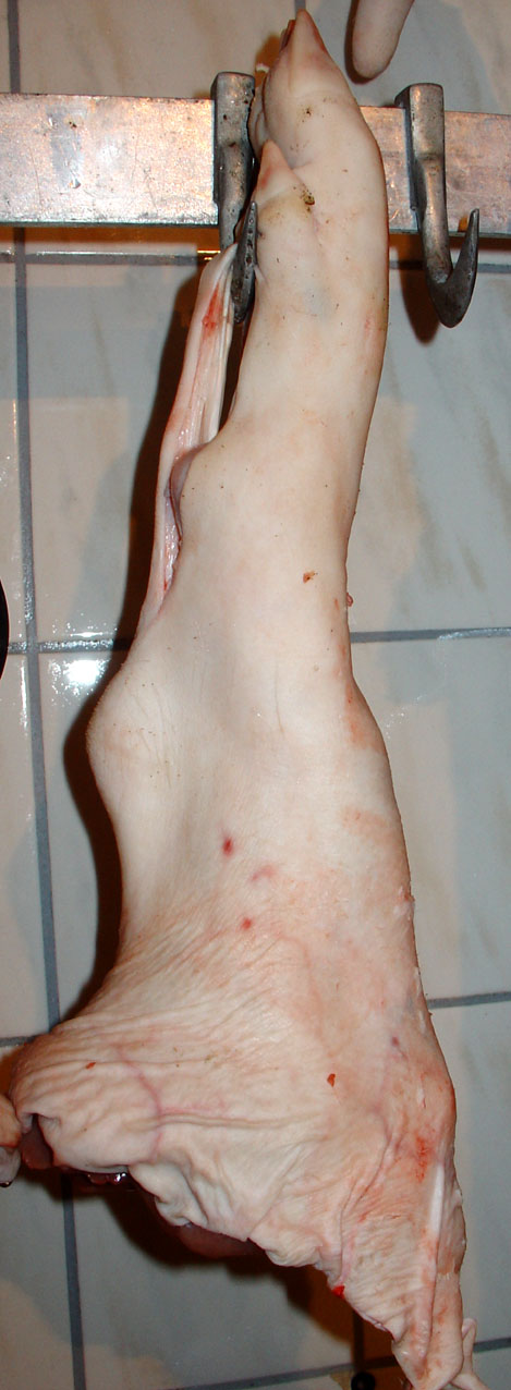 Eisbein und Spitzben (roh)